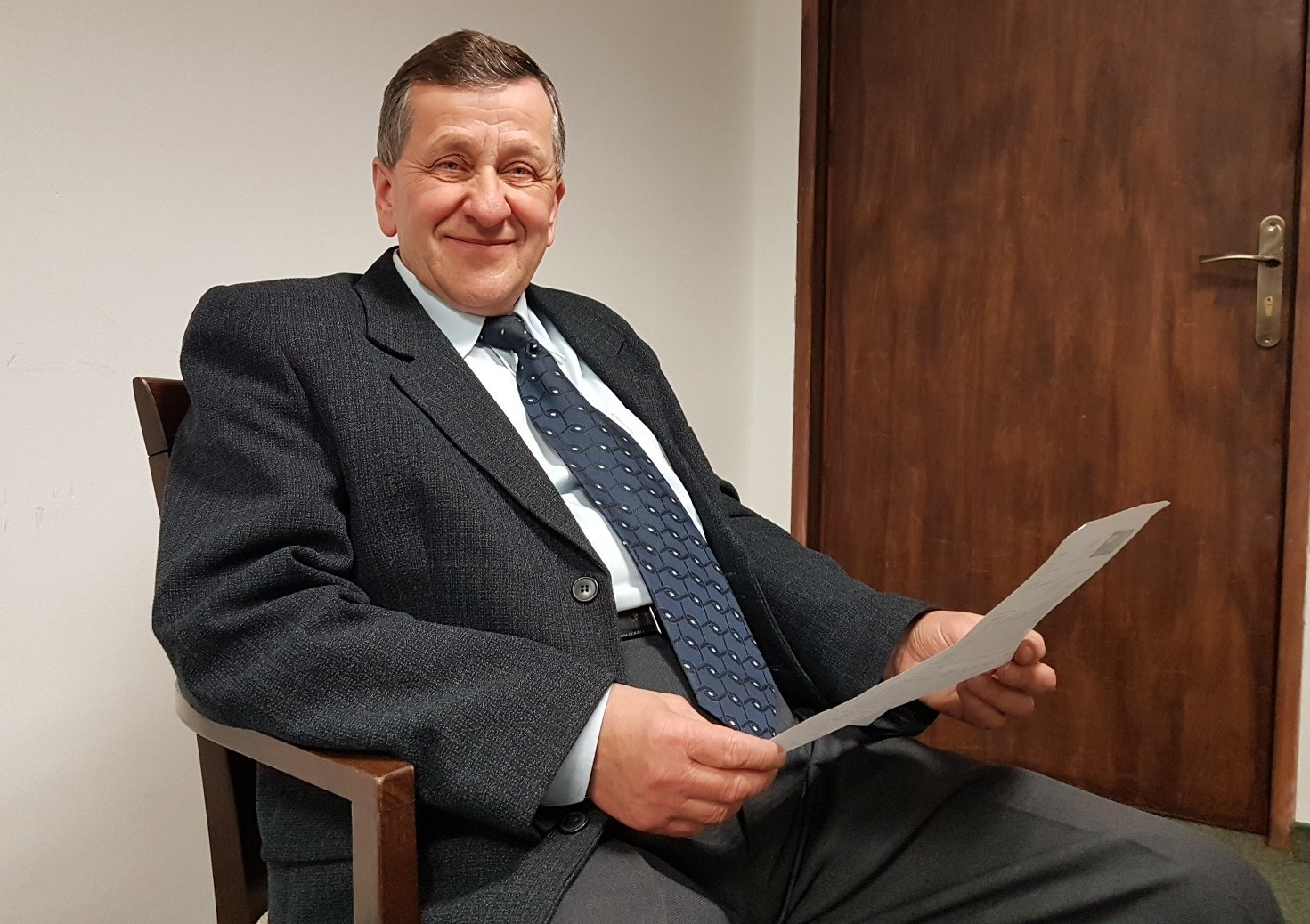 Ryszard Pasikowski, 27.01.2018